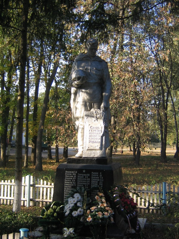 Братська могила